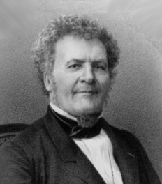 Estampe de P. Paris